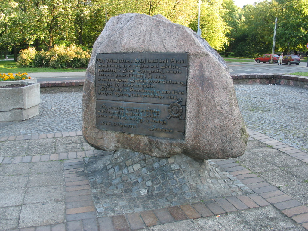 Pamiątka 575 rocznicy praw miejskich Łódź